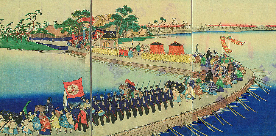 『武州六郷船渡圖』魁斉芳年画、三枚揃錦絵。明治元年10月の明治天皇の東京行幸における六郷の渡しでの情景。総勢2800人が六郷川（多摩川）に特設された船橋を渡っている。